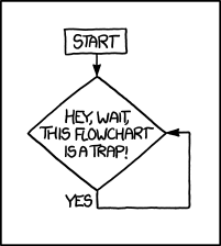 Egy vicces folyamatábra az XKCD-ről, ami megvilágítja az iteráció lényegét.